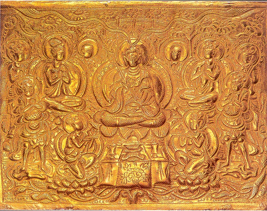 中文（台灣）: 法門寺 出土第一枚佛陀影骨舍利 八重寶函